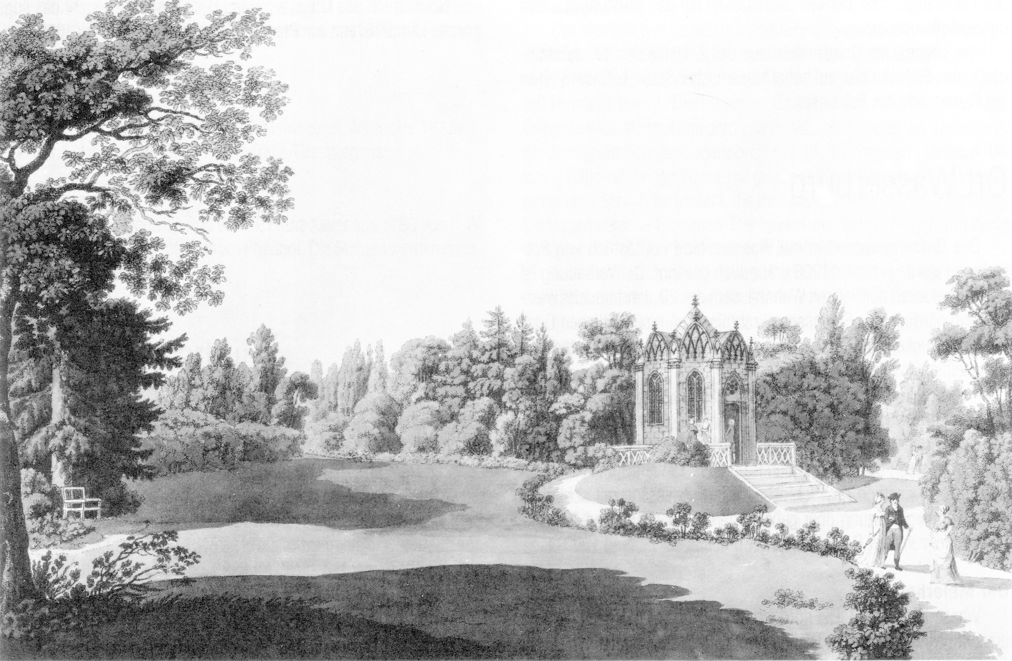 Garten des Schlosses Pottenbrunn, 18. Jhdt von Laurenz Janscha